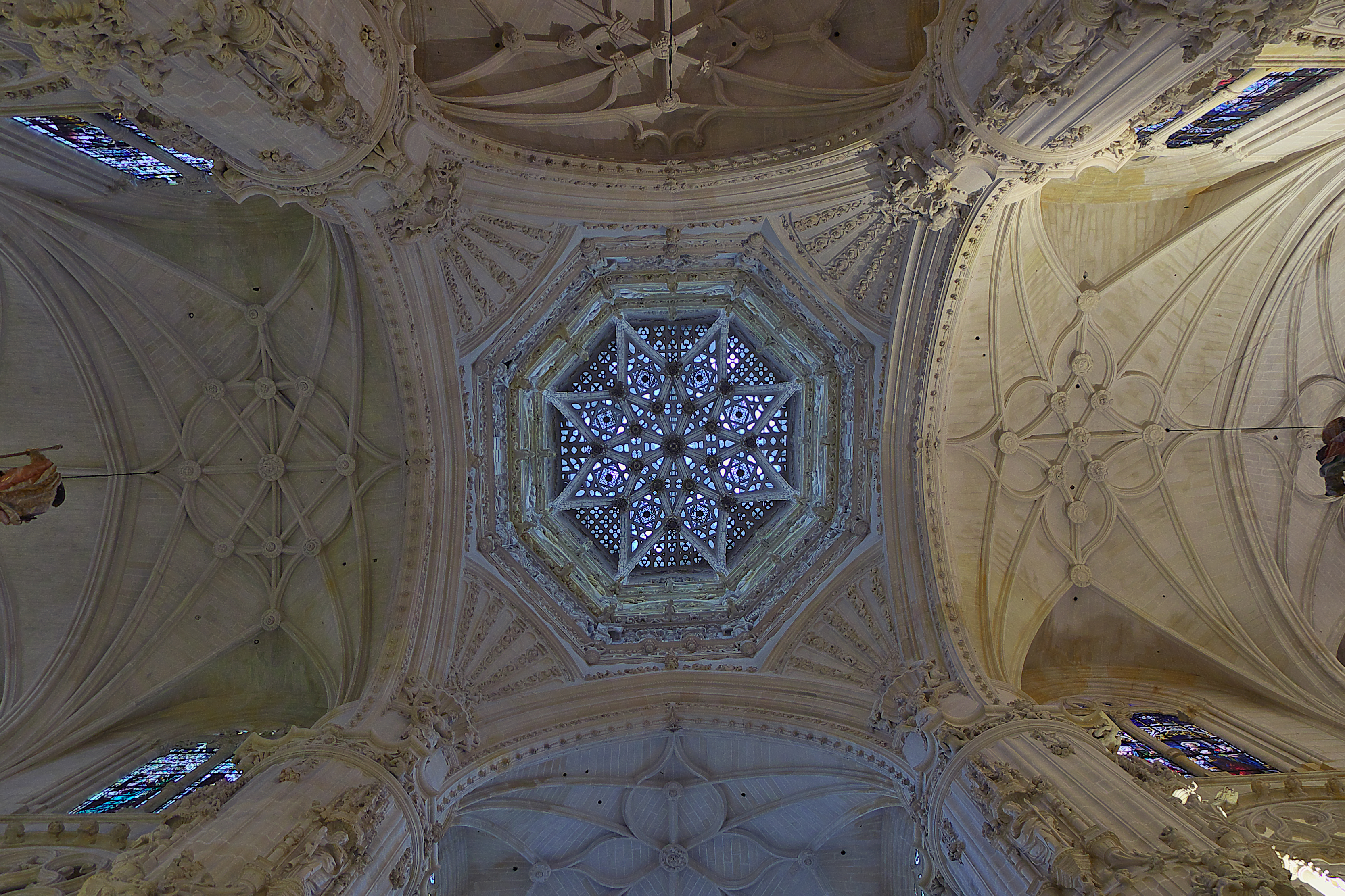 Juan de Colonia traza el cimborrio de la catedral (1466), posiblemente de planta octogonal, y del que se desconoce dibujo alguno. En 1539 sufre derrumbre, siendo Juan de Vallejo (1540-1567) elegido para su reconstrucción con el taller más importante del naciente plateresco español, la catedral de Burgos. El soberbio equipo de los Vigarny, Juan de Langres, Picard, Andrés, ... y siempre la sombra de los Colonia.